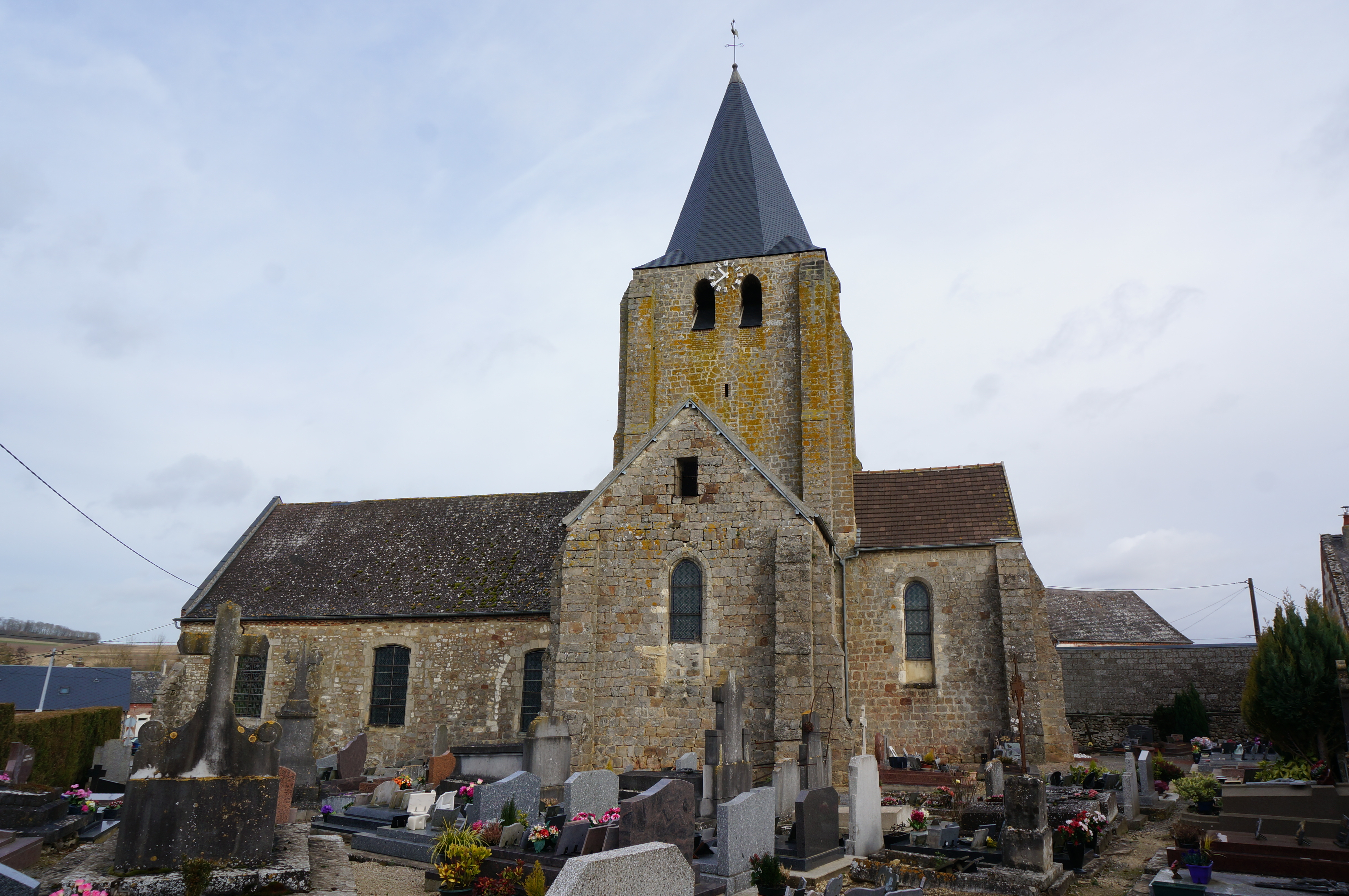 vue du village de Verneuil-sur-Serre.